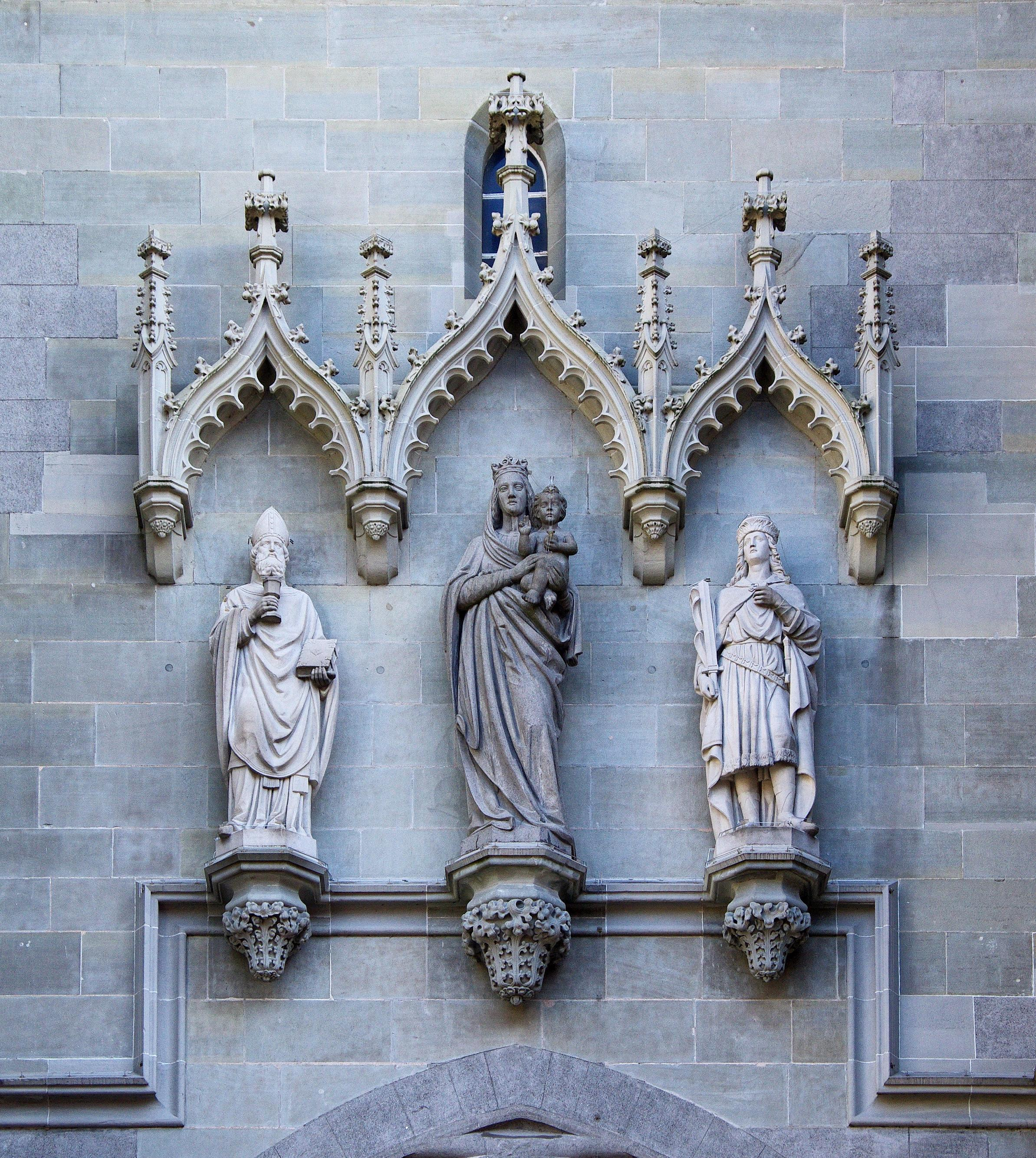 Die figuregruppe über dem Haupteingang